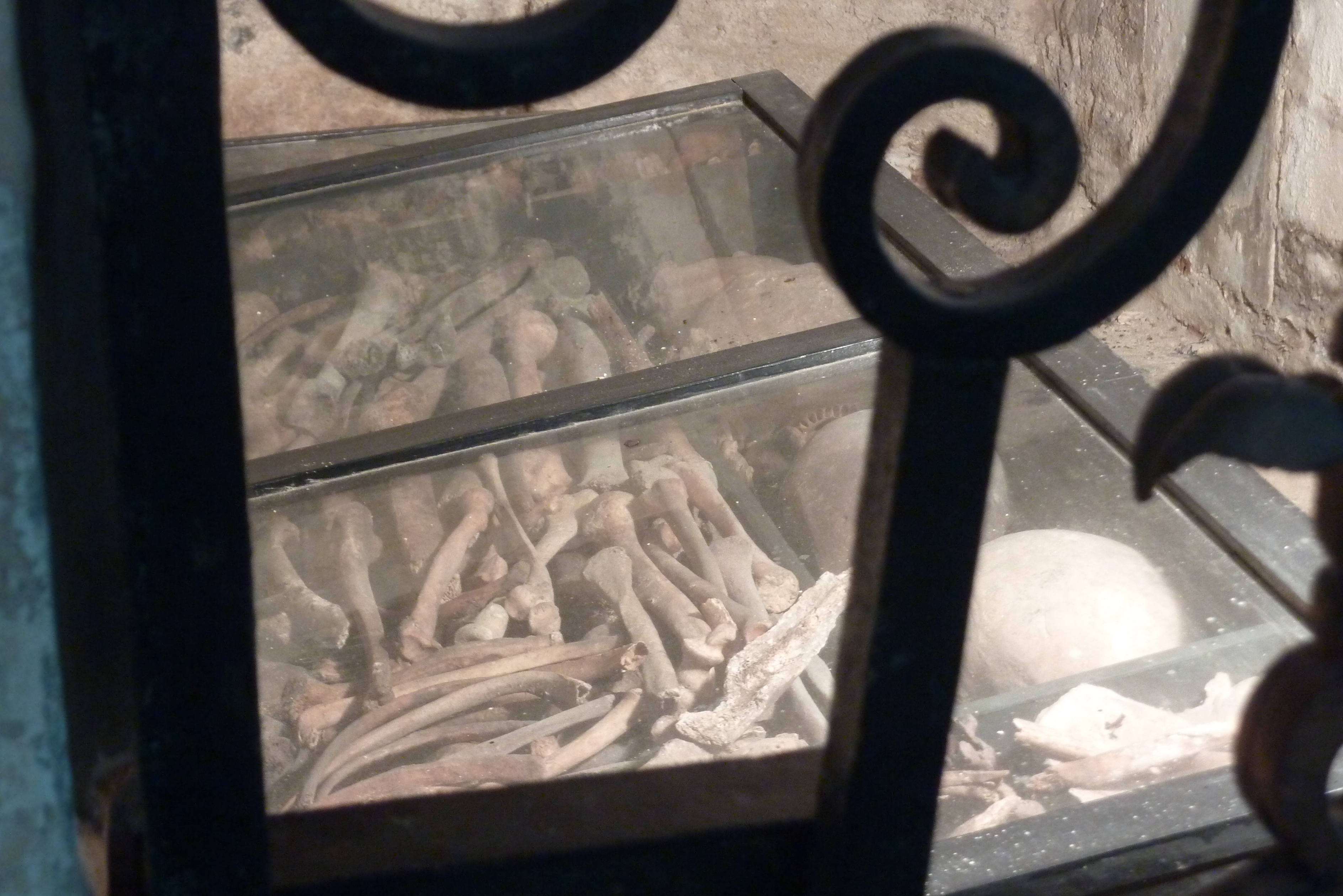 Ossements des princes du Barrois dans l'autel sur lequel repose le Transi de René de Chalon de Ligier Richier.